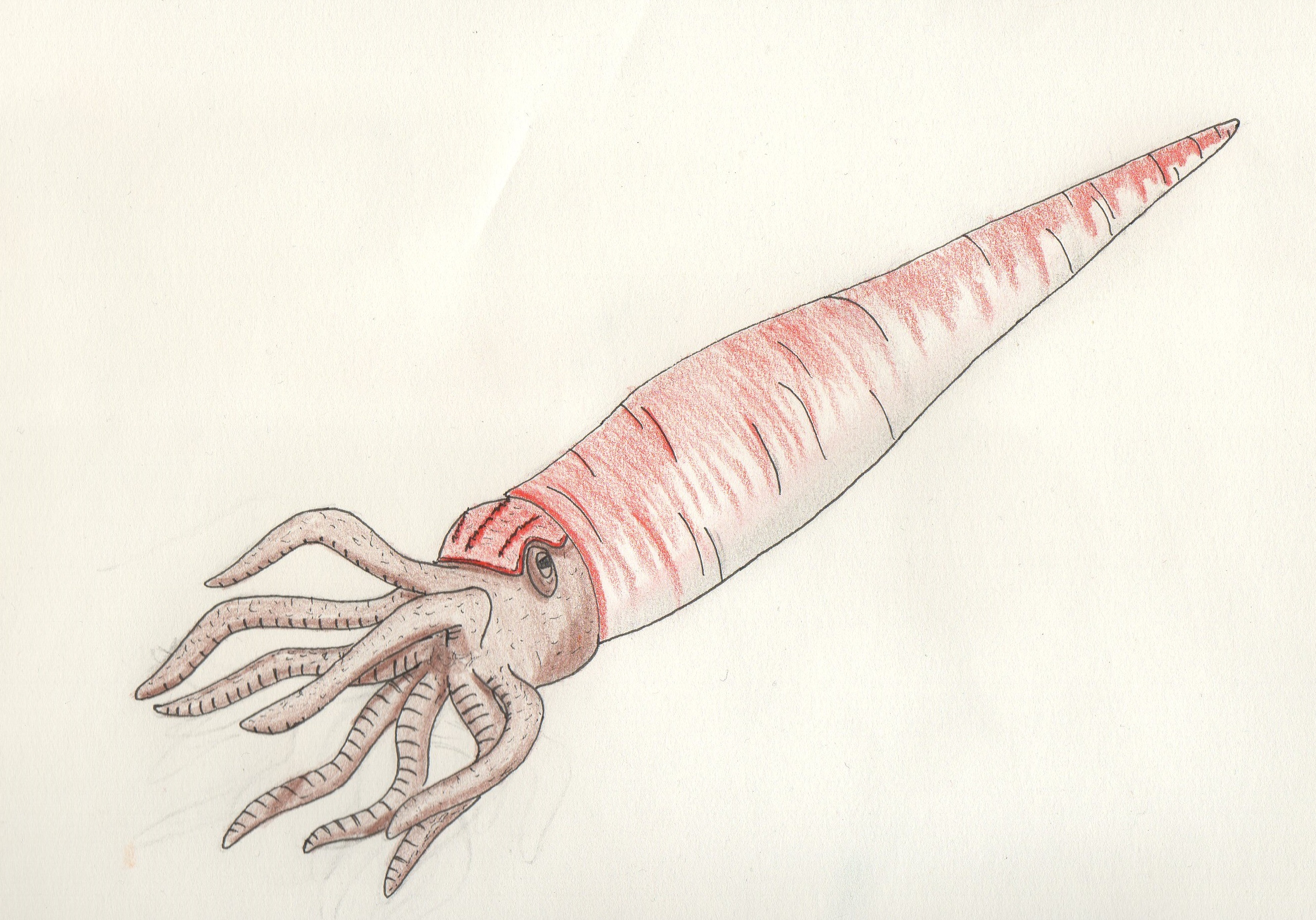 Reconstitution de Cameroceras